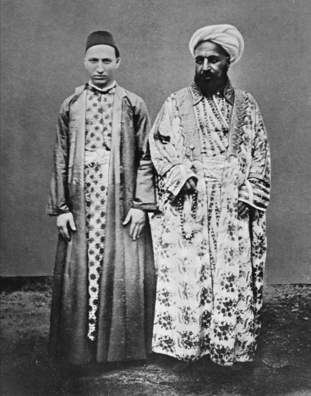 Comerciante de Meccan (derecha), con su esclavo circasiano. Atlas fotográfico de La Meca, La Haya, 1888-1889. Tomado en 1886-1887